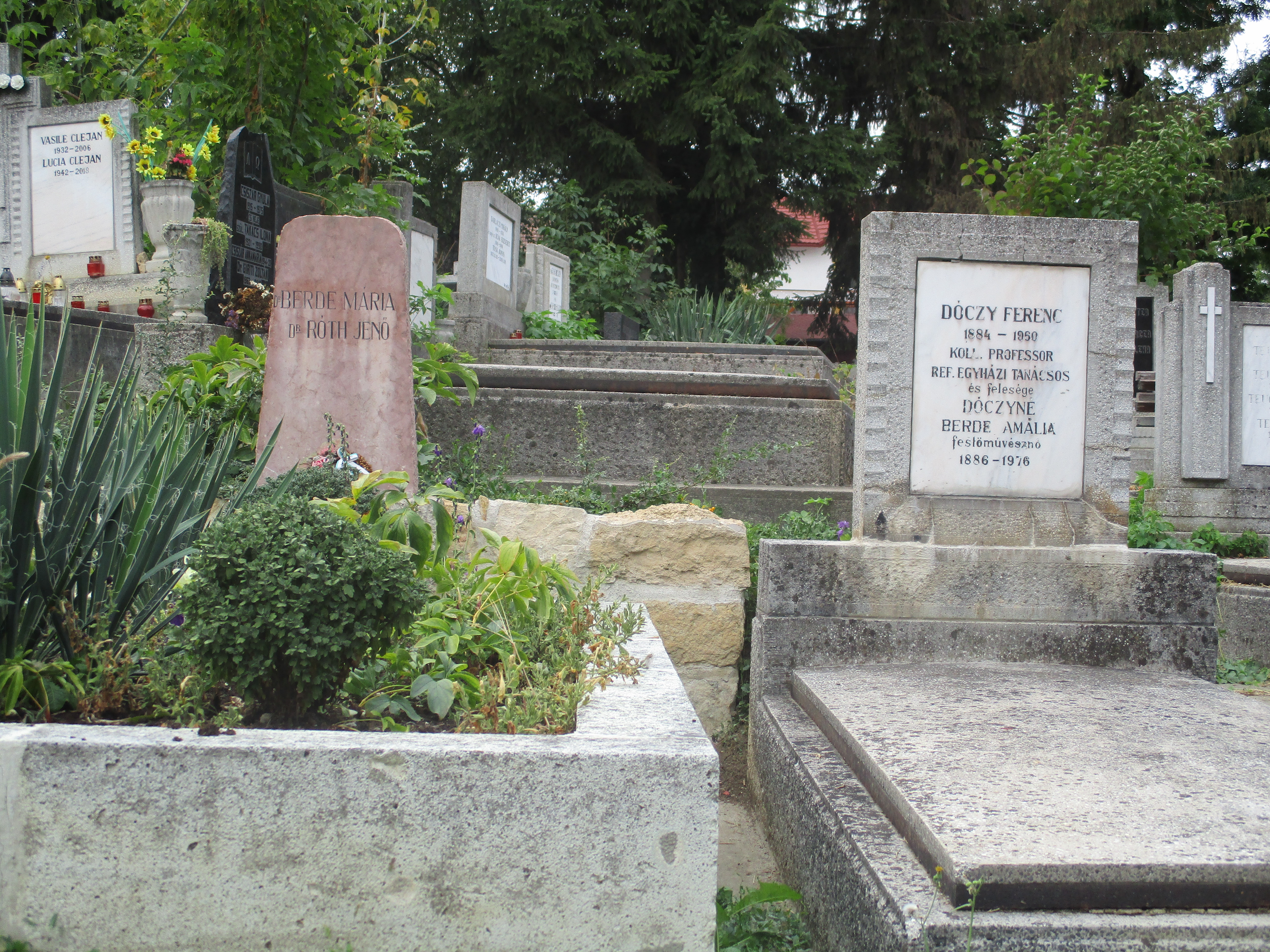 Mormântul pictoritei Berde Amália (1886-1976) (dr) și scriitoarei Berde Mária (1889-1949) (st)